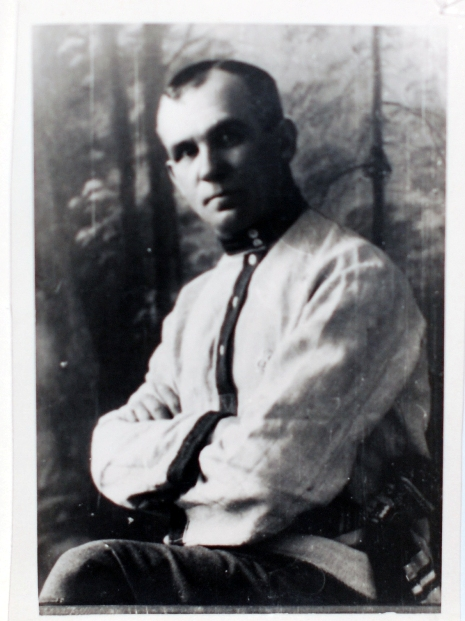 Гэты фотапартрэт Уладзіслаў Галубок надпісаў на памяць Аркадзю Смолічу. Фотаздымак перадала Арсеню Лісу жонка Аркадзя Смоліча